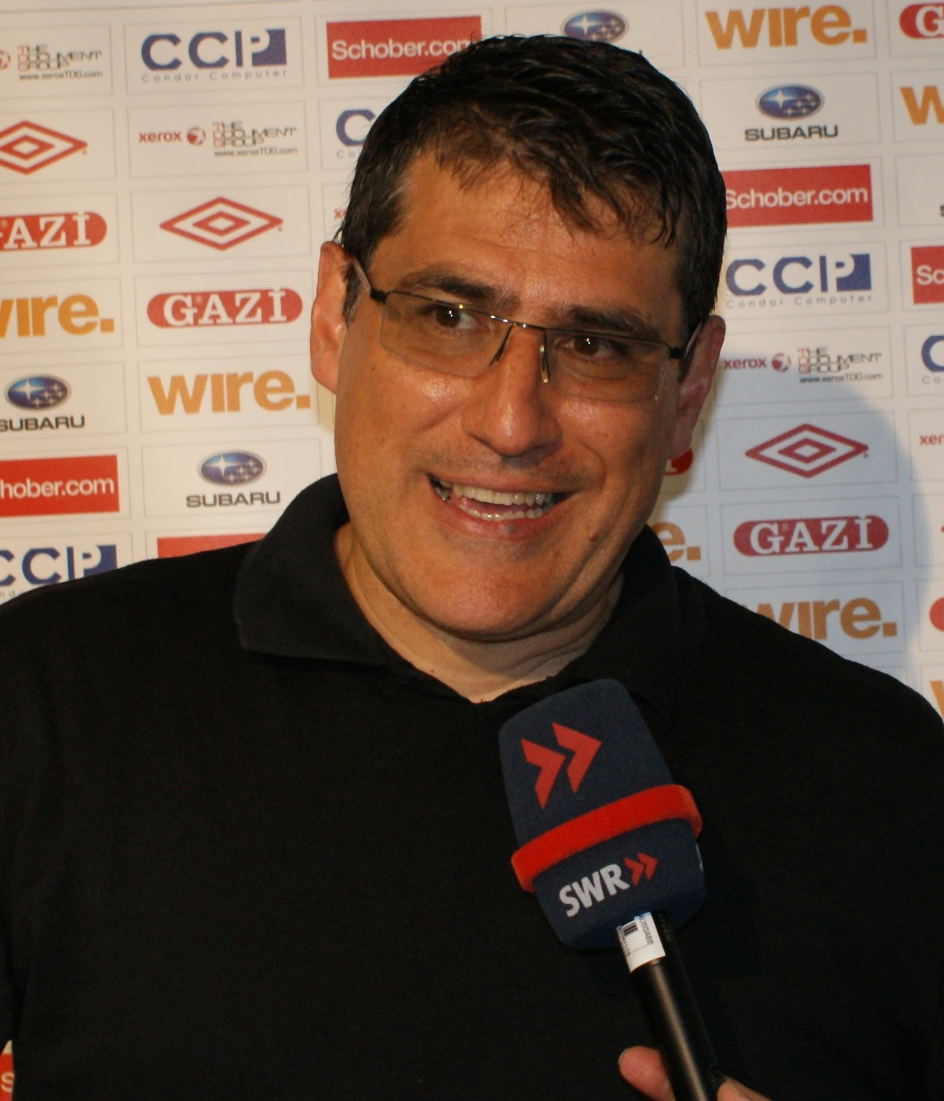 Massimo Morales bei einem Interview bei den Stuttgarter Kickers 2013